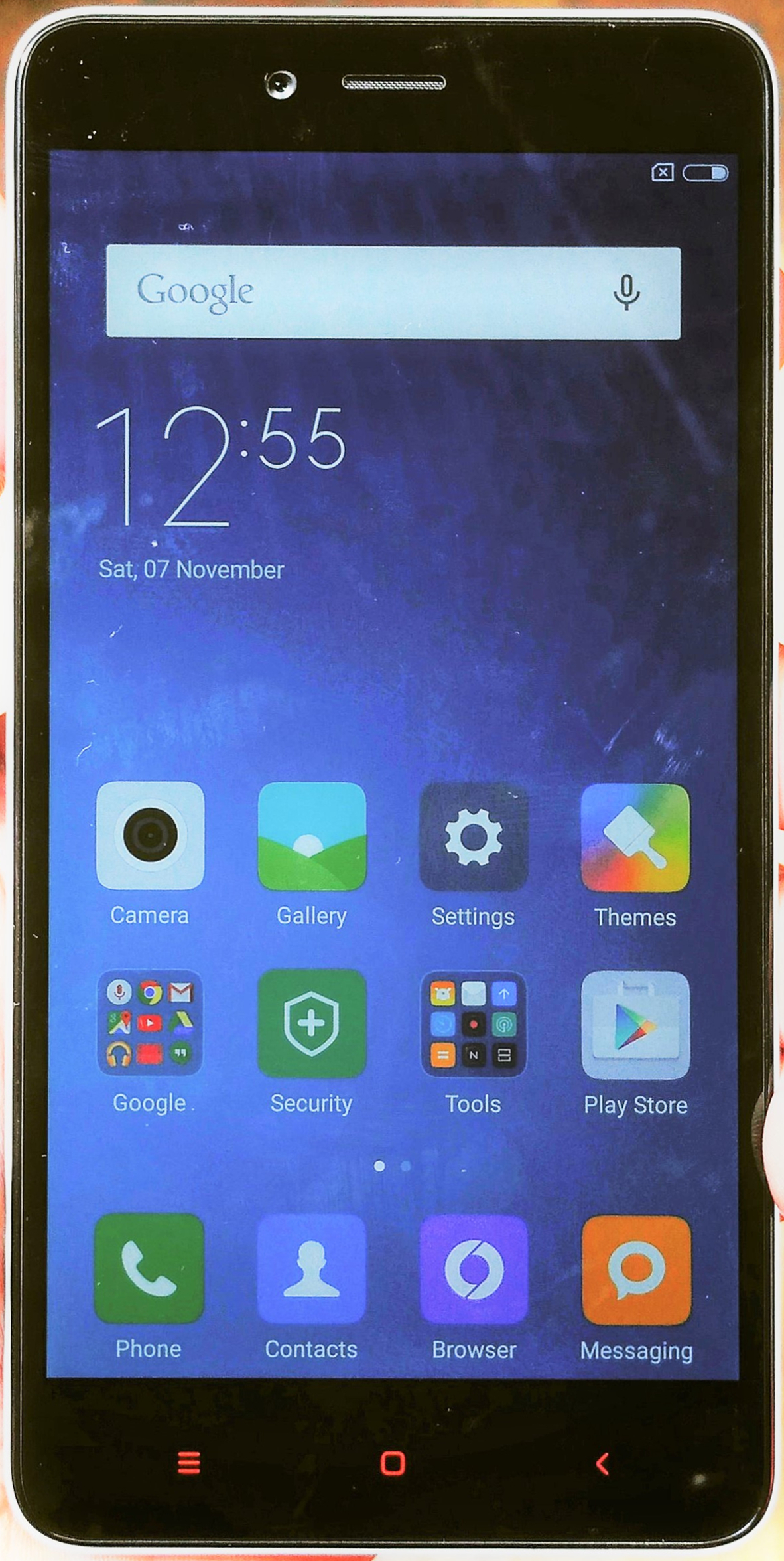 Une prise en main du Redmi Note 2.